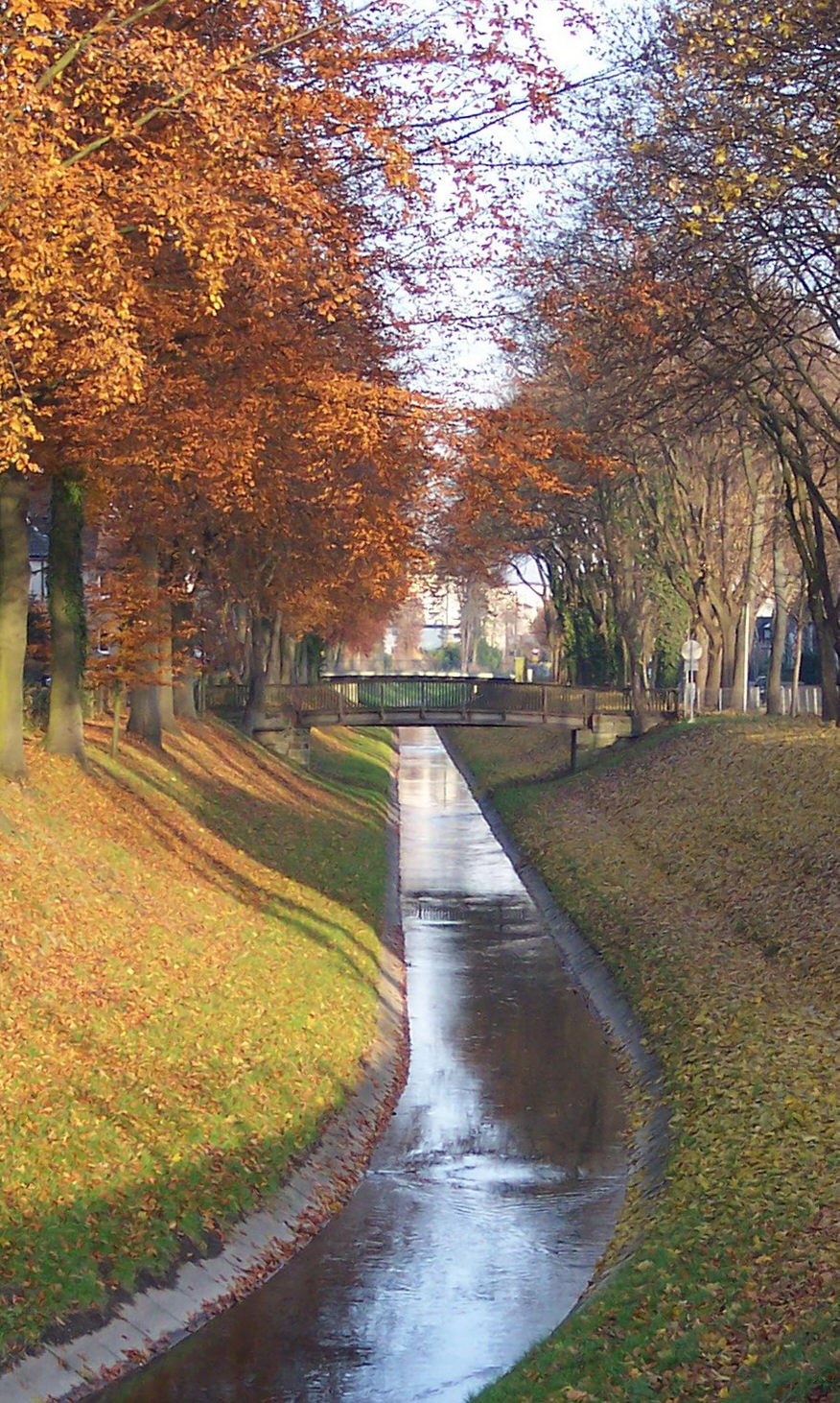 Description: Seseke in Kamen Source: Stahlkocher